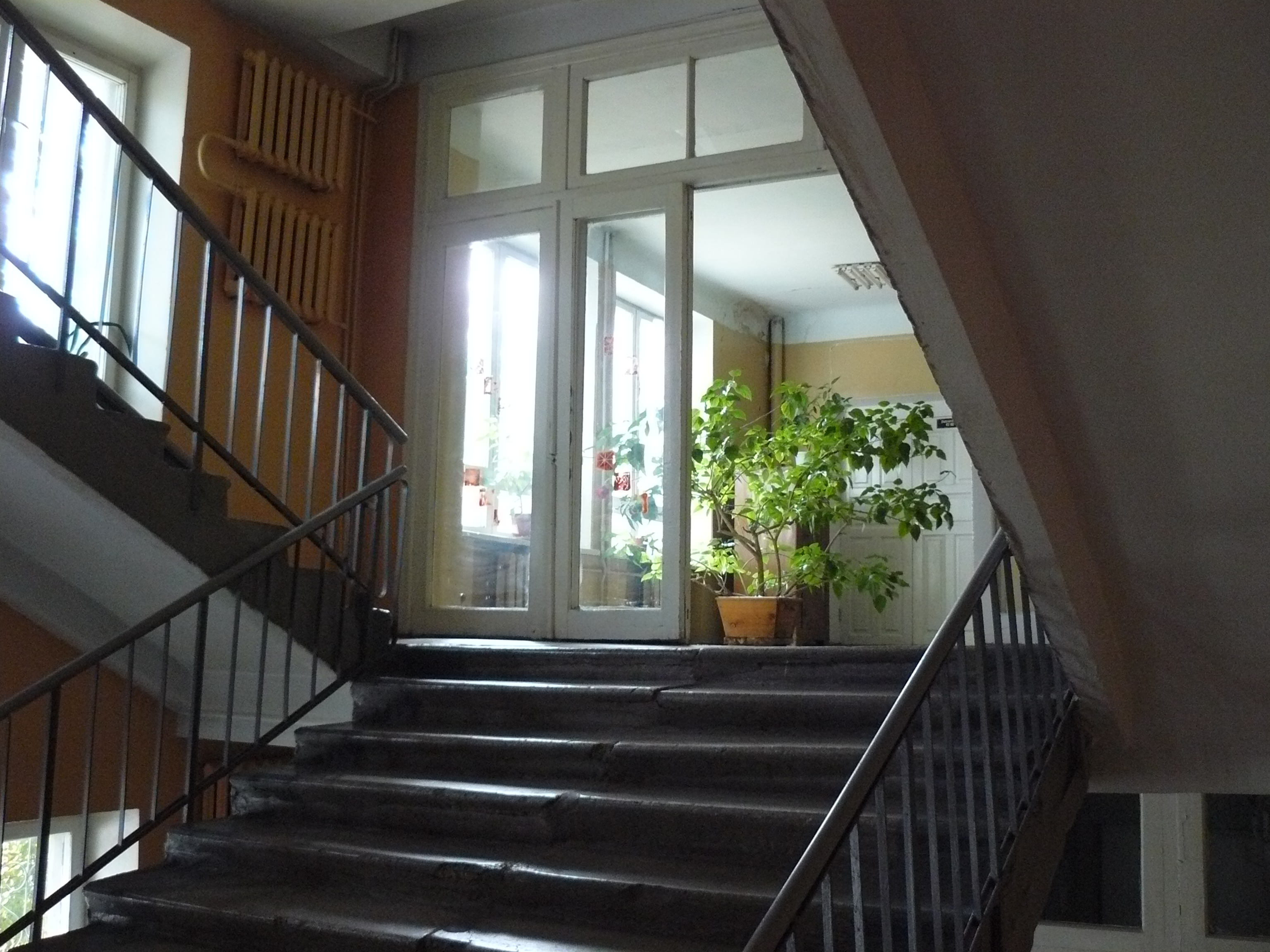 Физико-технический факультет ХНУ. Коридор и лестница